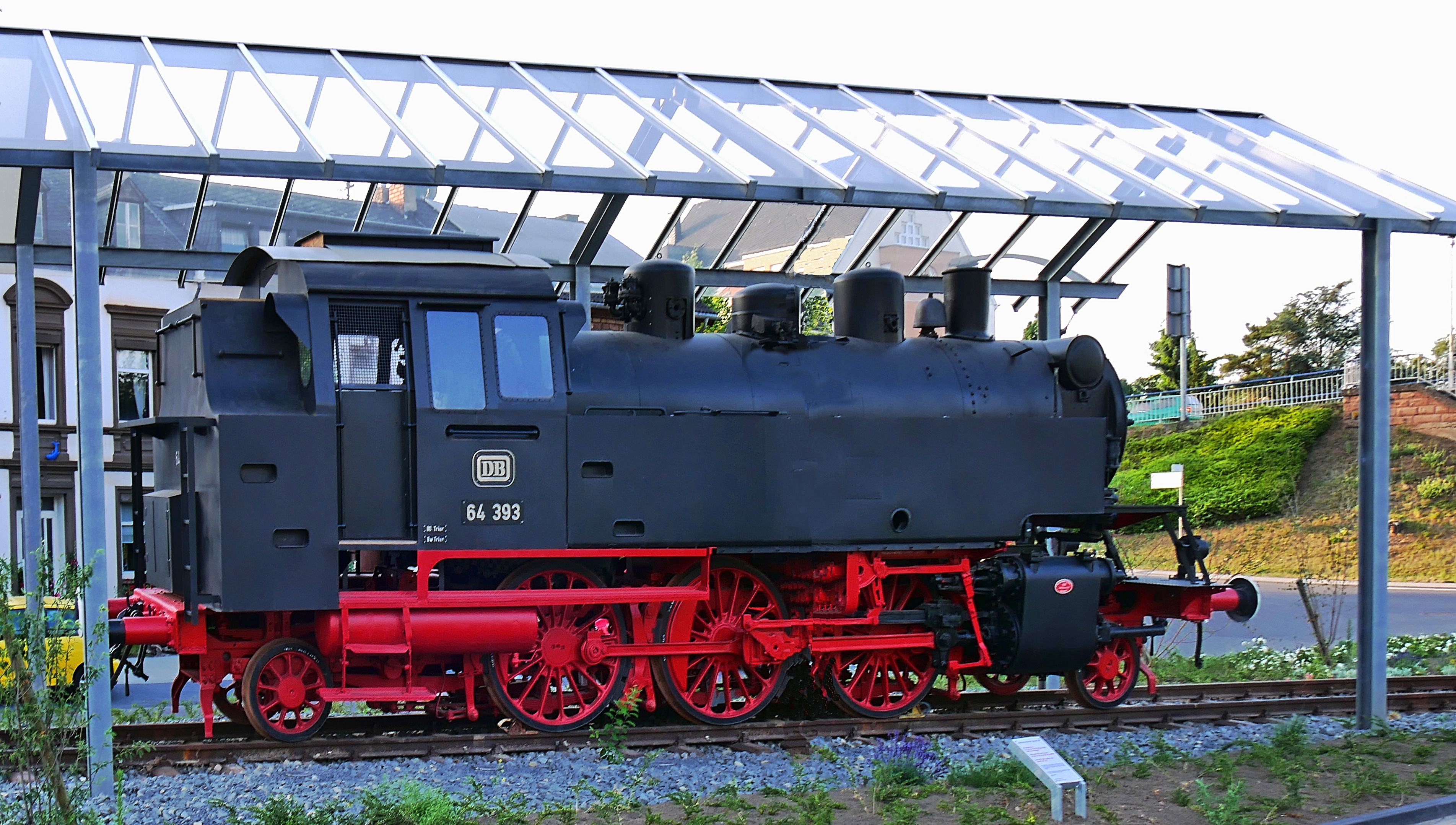 Die Denkmallok vor dem Konzer Hauptbahnhof. Abnahme am 30.10.1936 in Eßlingen 4306. Dienst in Waldshut, Karlsruhe, Regensburg, Kirchenlaibach, Weiten, 1974 ausgemustert und seither in Konz. 2012 bis 2016 restauriert.